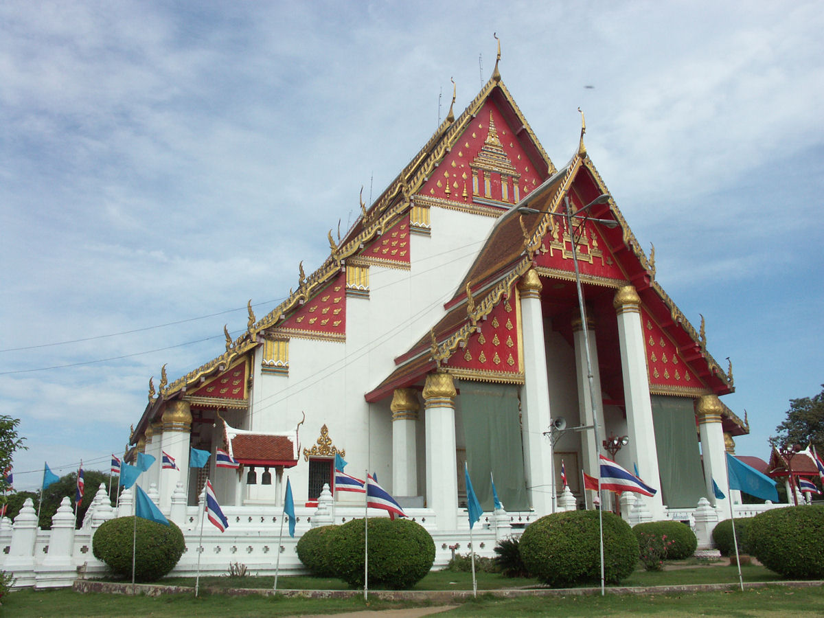 Phra Mongkhon Bophit (วัดพระมงคลบพิตร), Ayutthaya, Thailand